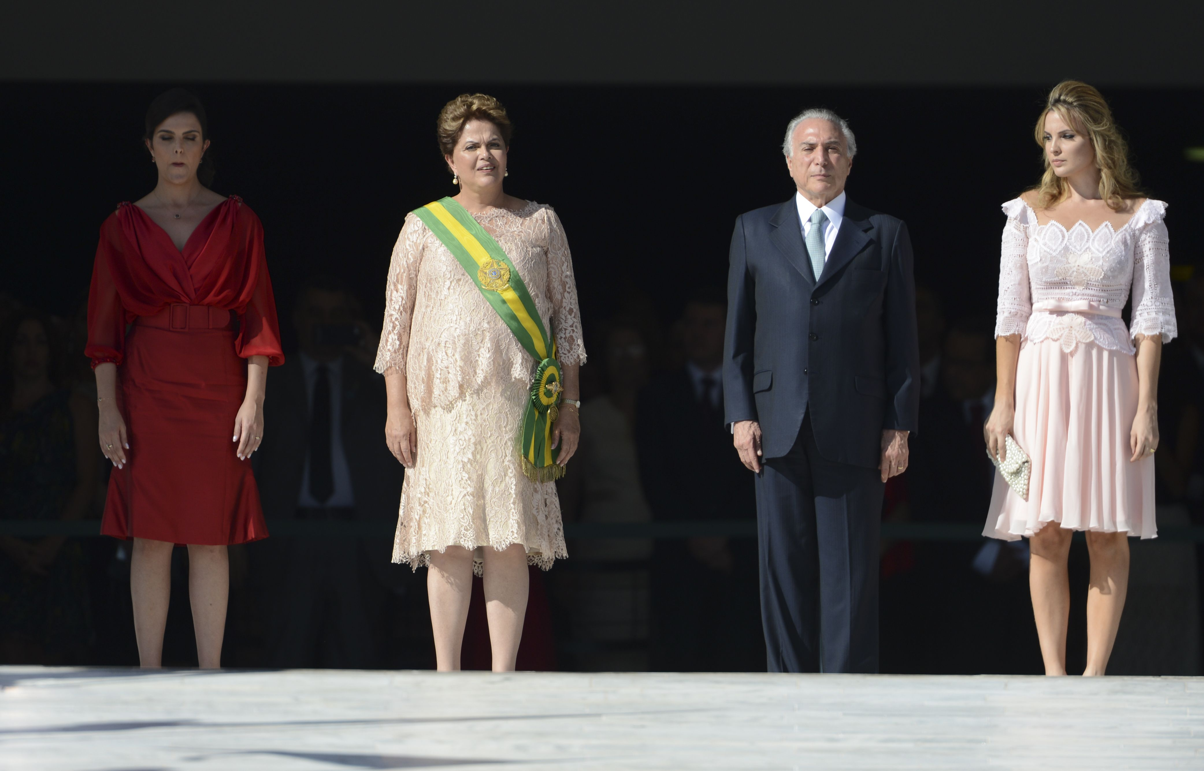 A presidente Dilma Rousseff acompanhado do vice, Michel Temer, da sua filha Paula Rousseff (de vermelho) e de Marcela Temer (esposa de Michel Temer) durante cerimônia de posse no Palácio do Planalto.